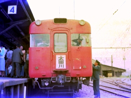 名鉄3780系電車(本線時代)